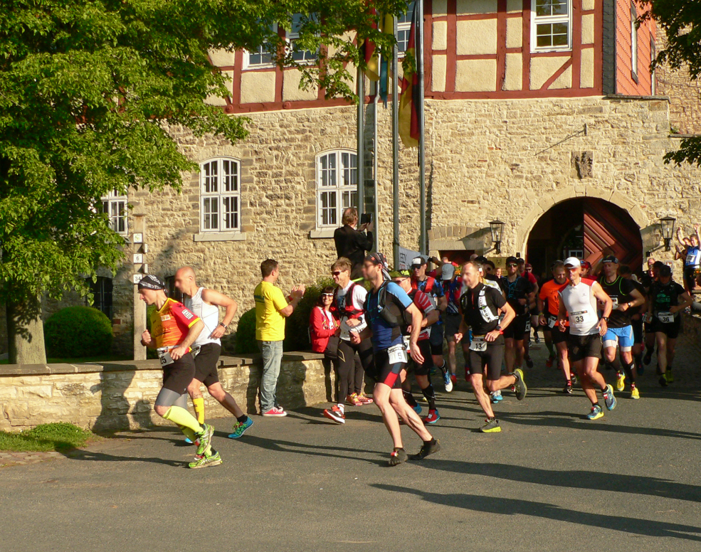 Start eines Laufes im Rahmen des Elm Super Trail am Burgtor der Burg Warberg